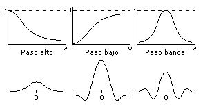 Tipos de filtros sobre la frecuencia. Corrección: El filtro paso alto espacial de la foto es en realidad el filtro paso bajo espacial.